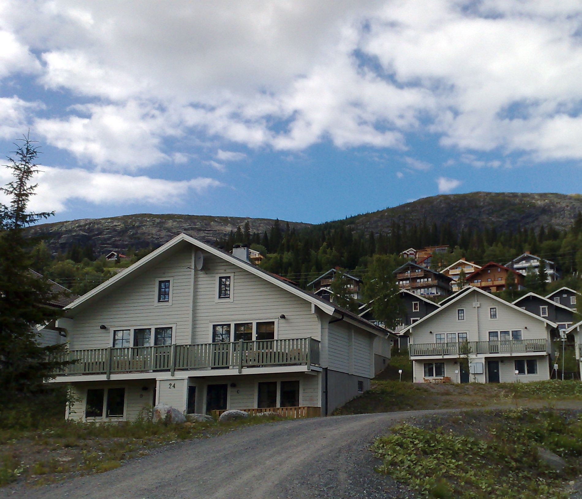 Tegefjäll